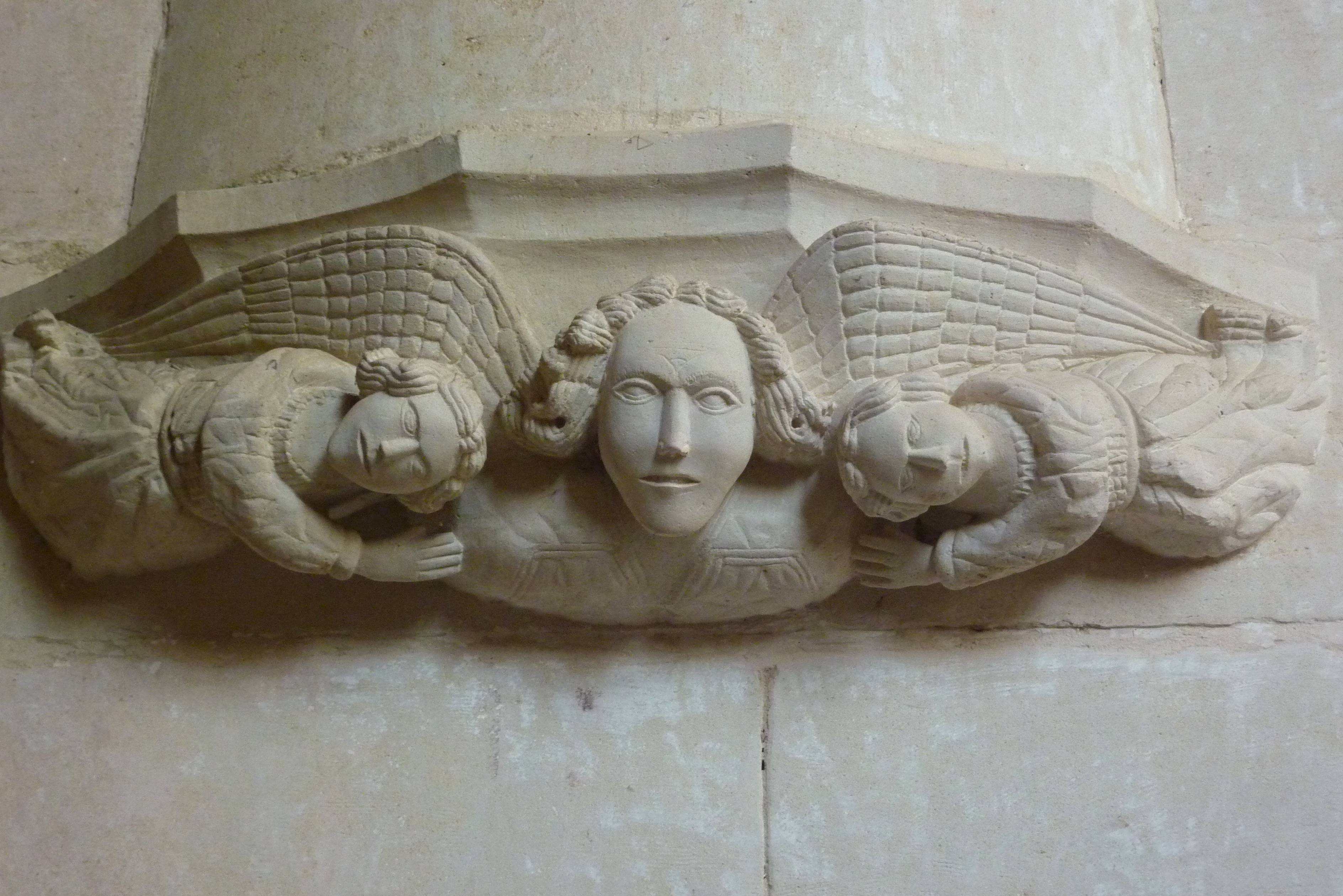 Katholische Kirche Notre-Dame-de-l'Assomption in Droyes im Département Haute-Marne (Champagne-Ardenne/Frankreich), Konsole .